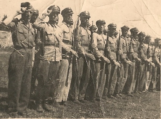 Oddział Milicji Obywatelskiej ustawiony do przeglądu. Pogórze Dynowskie 1946 rok z okresu walk z bandami UPA i tzw. polskim zbrojnym podziemiem. Ze zbiorów własnych M. Zych.